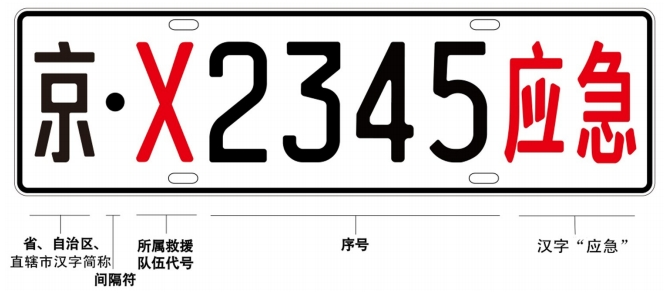 汽车号牌编码规则